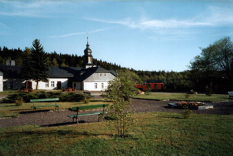 Technisches Denkmal Lehesten